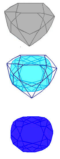 The three stages of transformation from the great blue diamond of the crown of France (lead replica) to the Hope Diamond in it's present form.